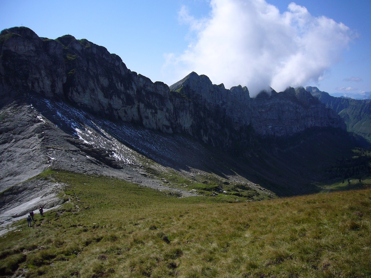 Wiggis ganz links in der Kette mit Gumenstock und Schijen; Sicht aus Nordost.